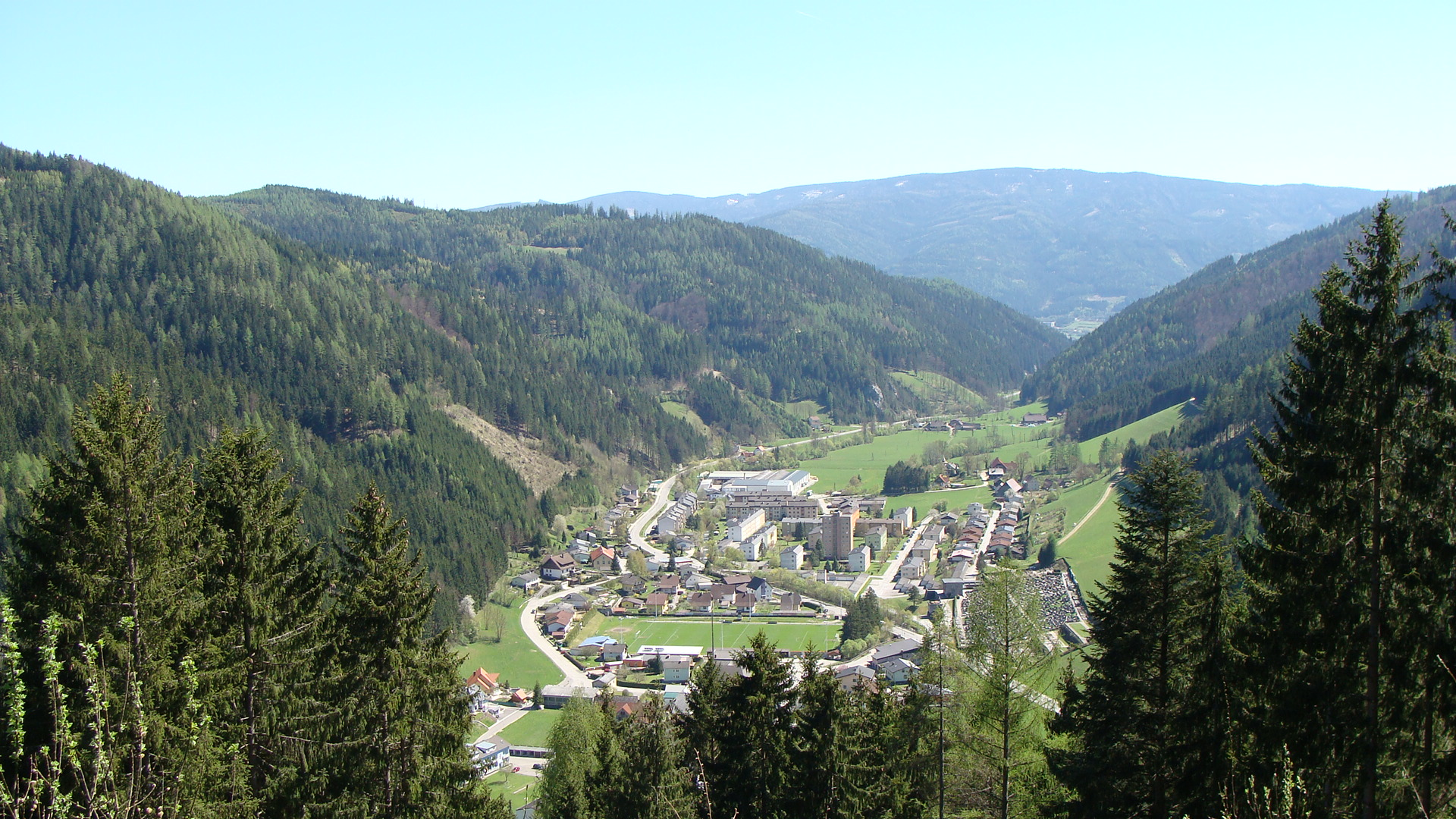 Das Veitschtal mit dem Dorf-Veitsch im Vordergrund (Blick Richtung Süden ins Mürztal).